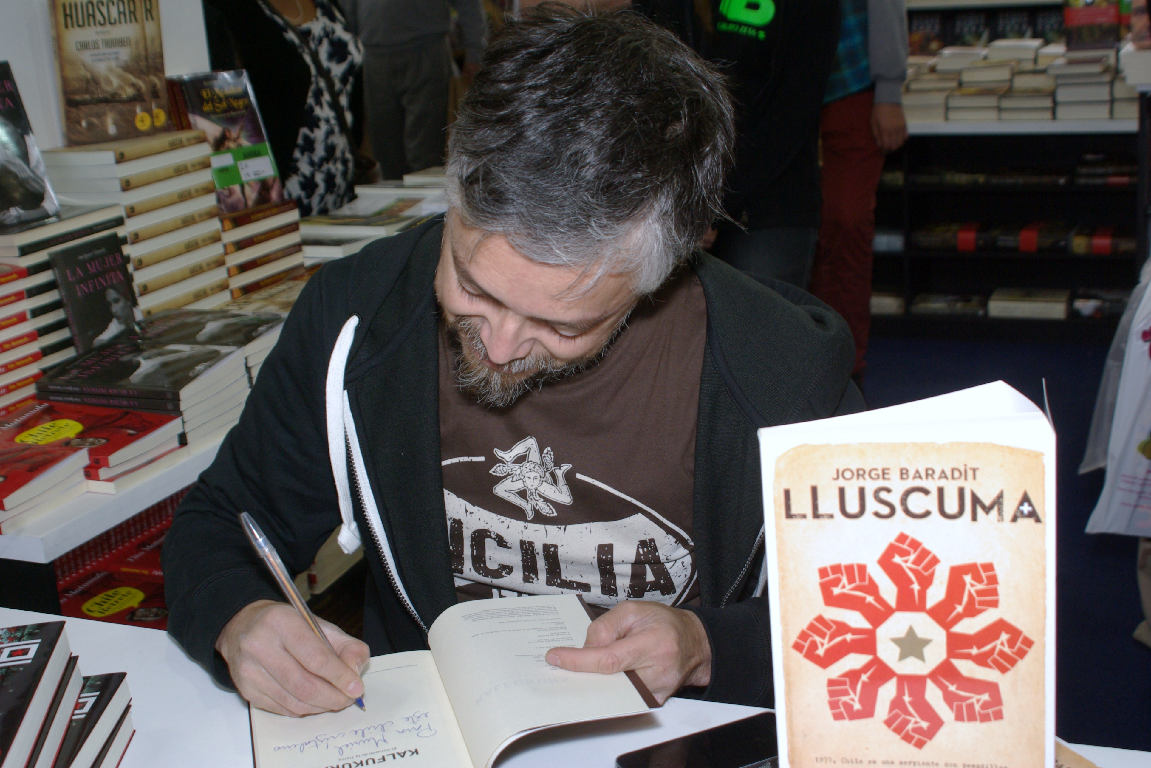 El escritor chileno Jorge Baradit en la Feria Internacional del Libro de Santiago 2015